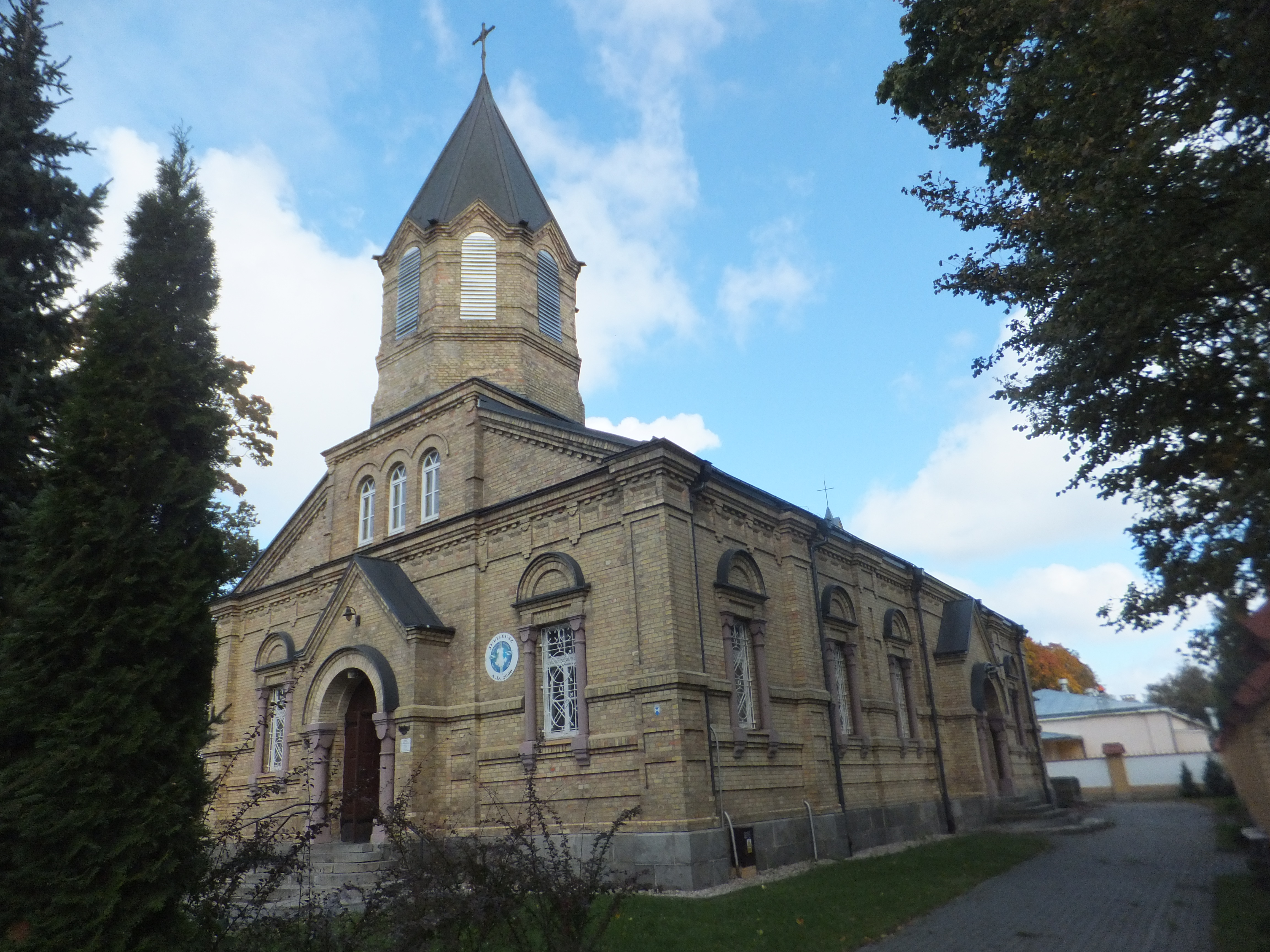 Białystok, cerkiew garnizonowa, ob. kościół rzym.-kat. par. p.w. św. Stanisława, 4 ćw. XIX